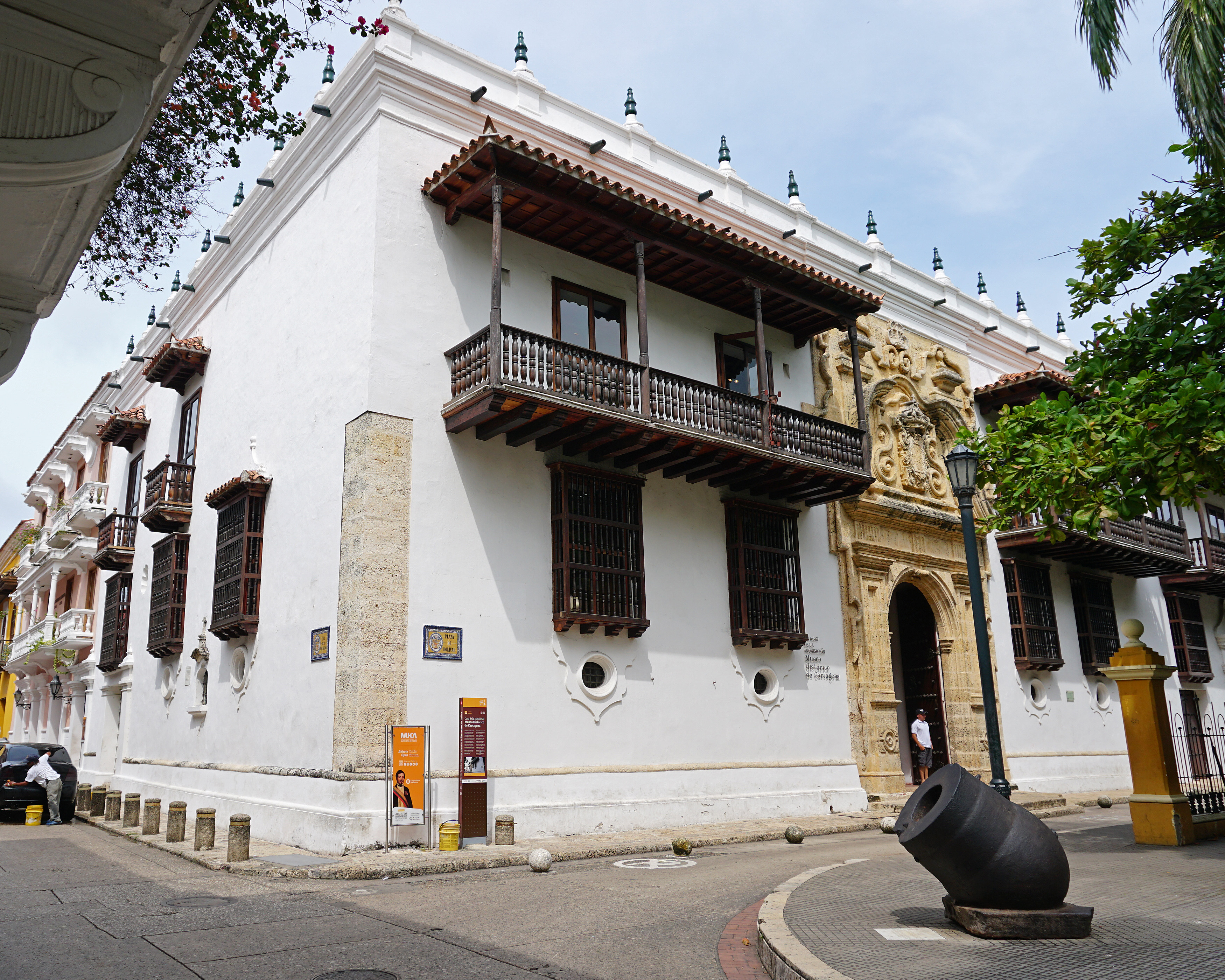 Vista exterior del Palacio de la Inquisición de Cartagena de Indias, Colombia